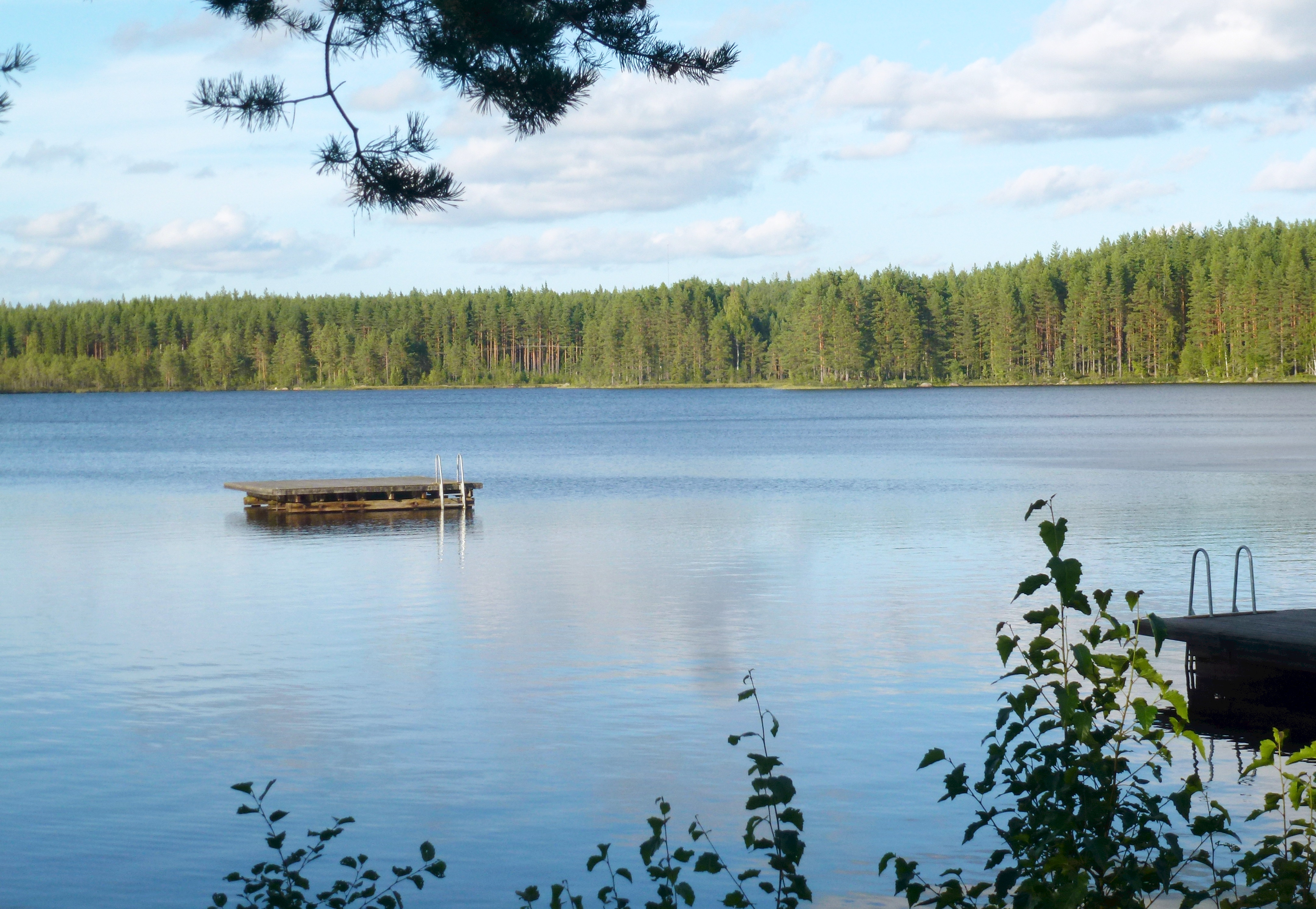 Havstjärnen (Grangärde socken, Dalarna)